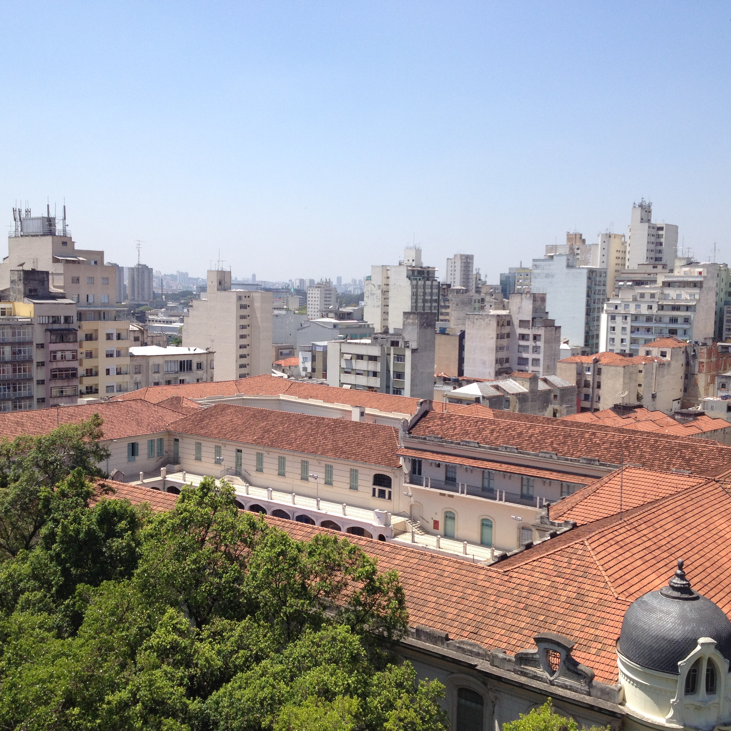 Vista aérea das dependências do Colégio de Santa Inês em São Paulo (SP), Brasil.